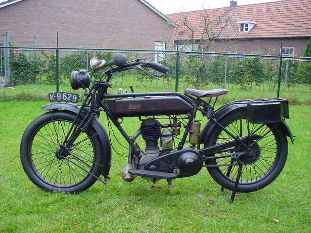 Toestemming van Yesterdays Antique Motorcycles (